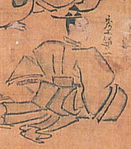 戸沢家15代戸沢秀盛の肖像画(戸沢家歴代肖像より)。